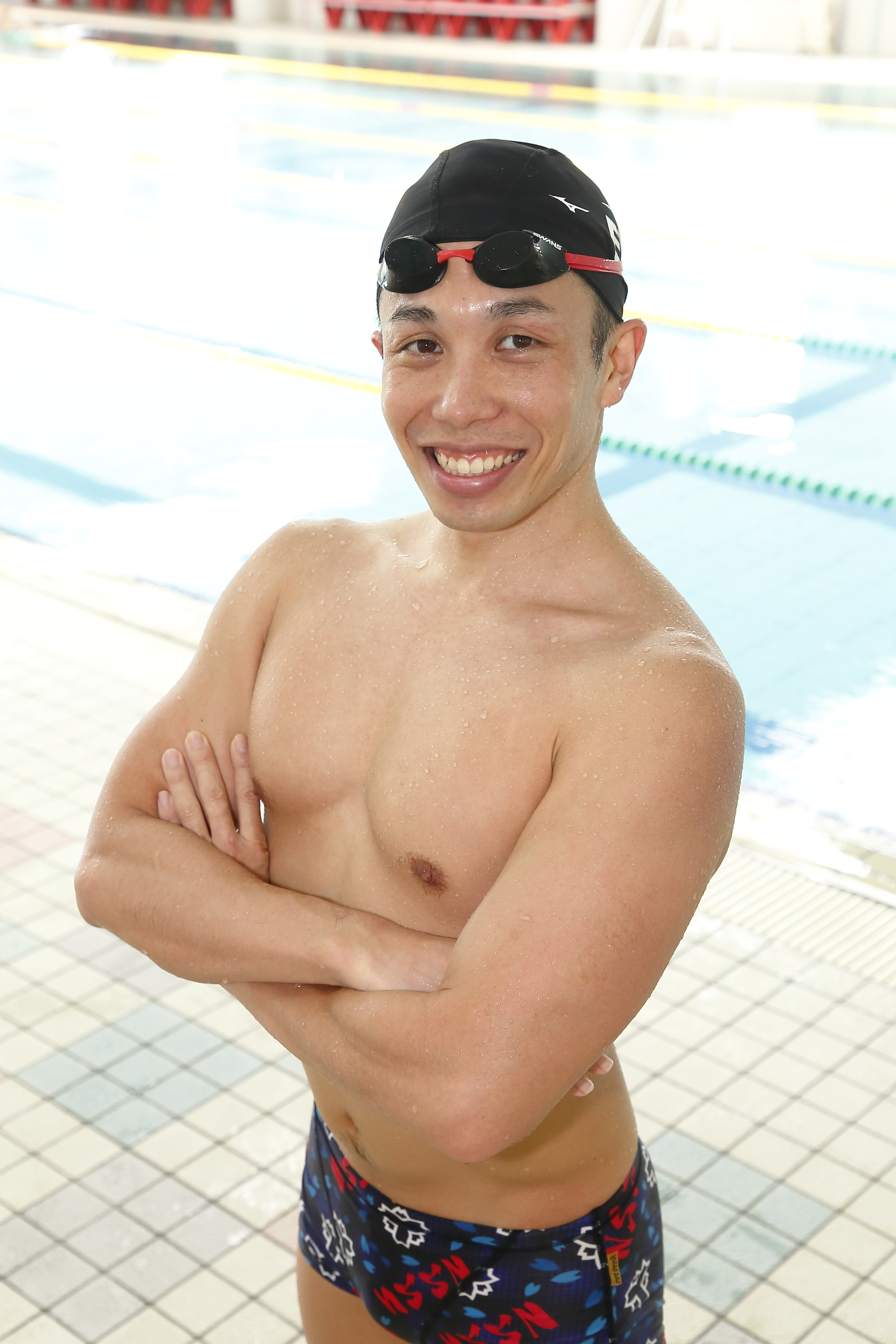 熊本にて2020年6月